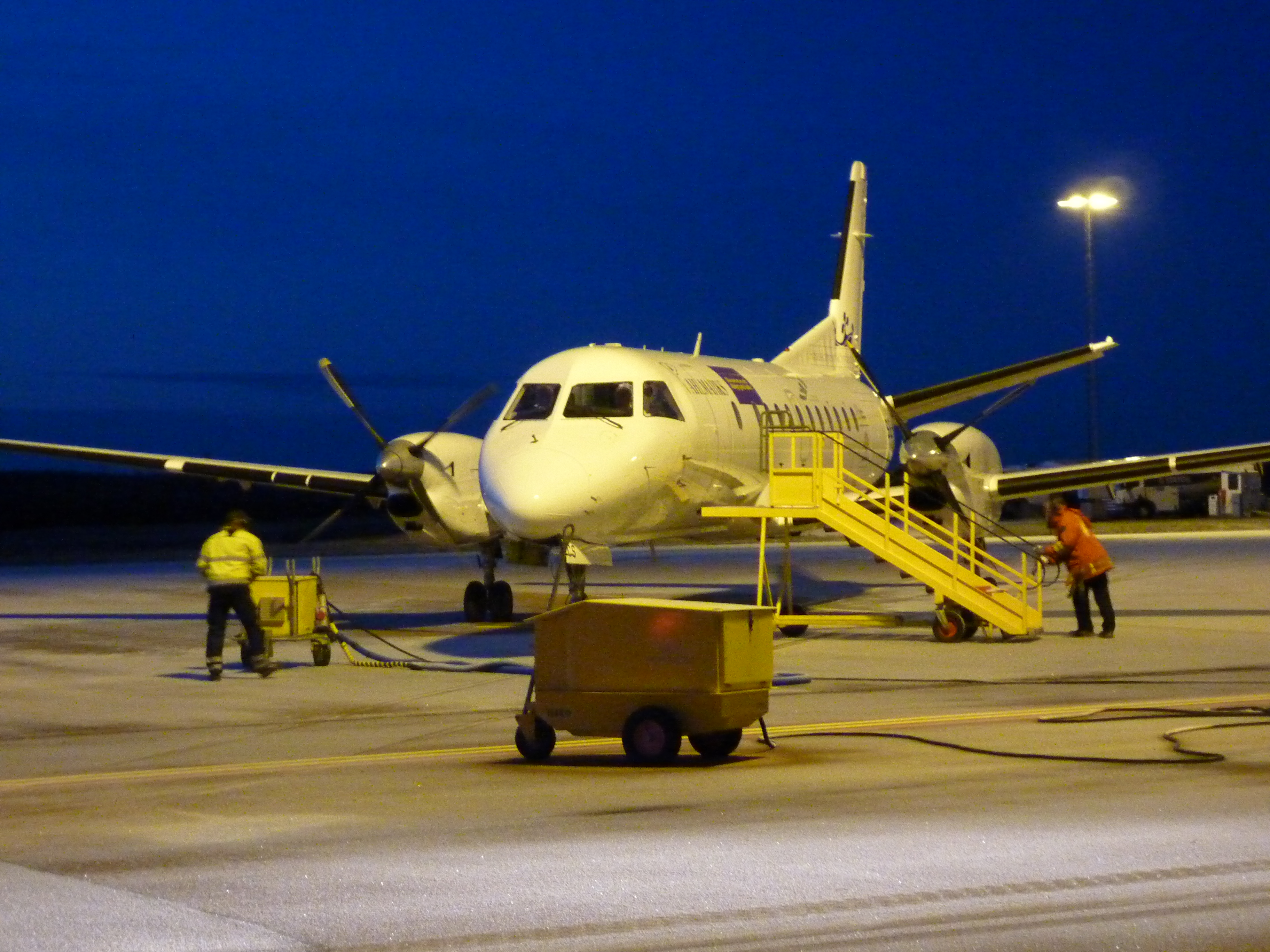 SE-KCA kom till KSD på eftermiddagen och flög sedan till Köpenhamn tur och retur. Detta flygplan är målat med Ahlmarks, Löfbergs Lila och Region Värmland på Sidorna